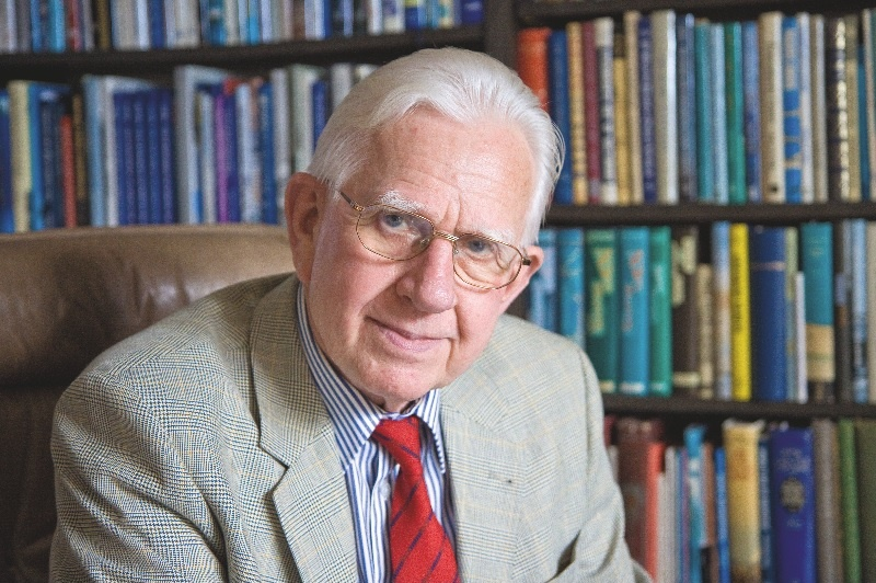 Porträtfotografie von Arnold Kludas